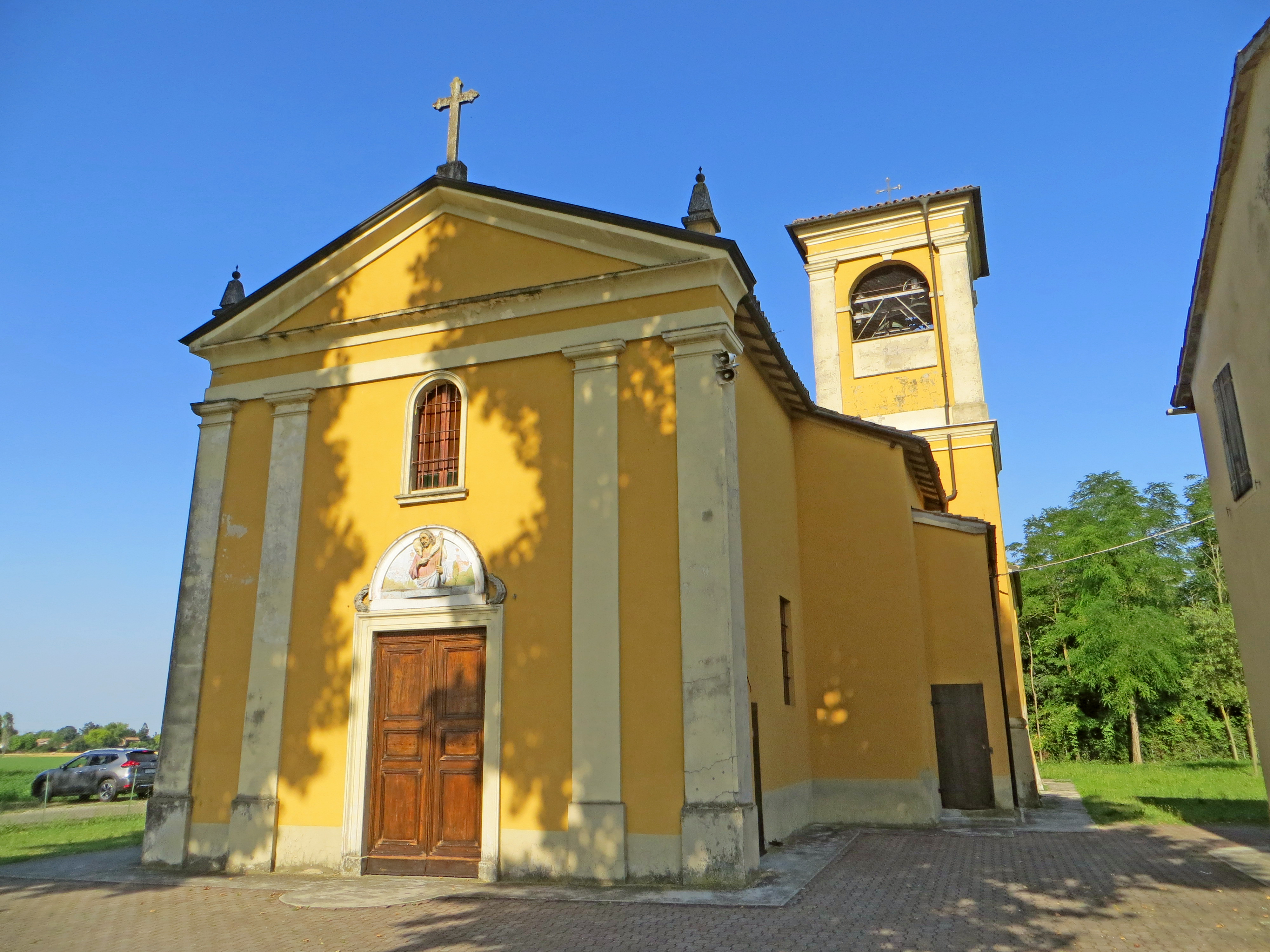 Chiesa di San Giacomo Apostolo (Vigheffio, Parma) - facciata e lato sud